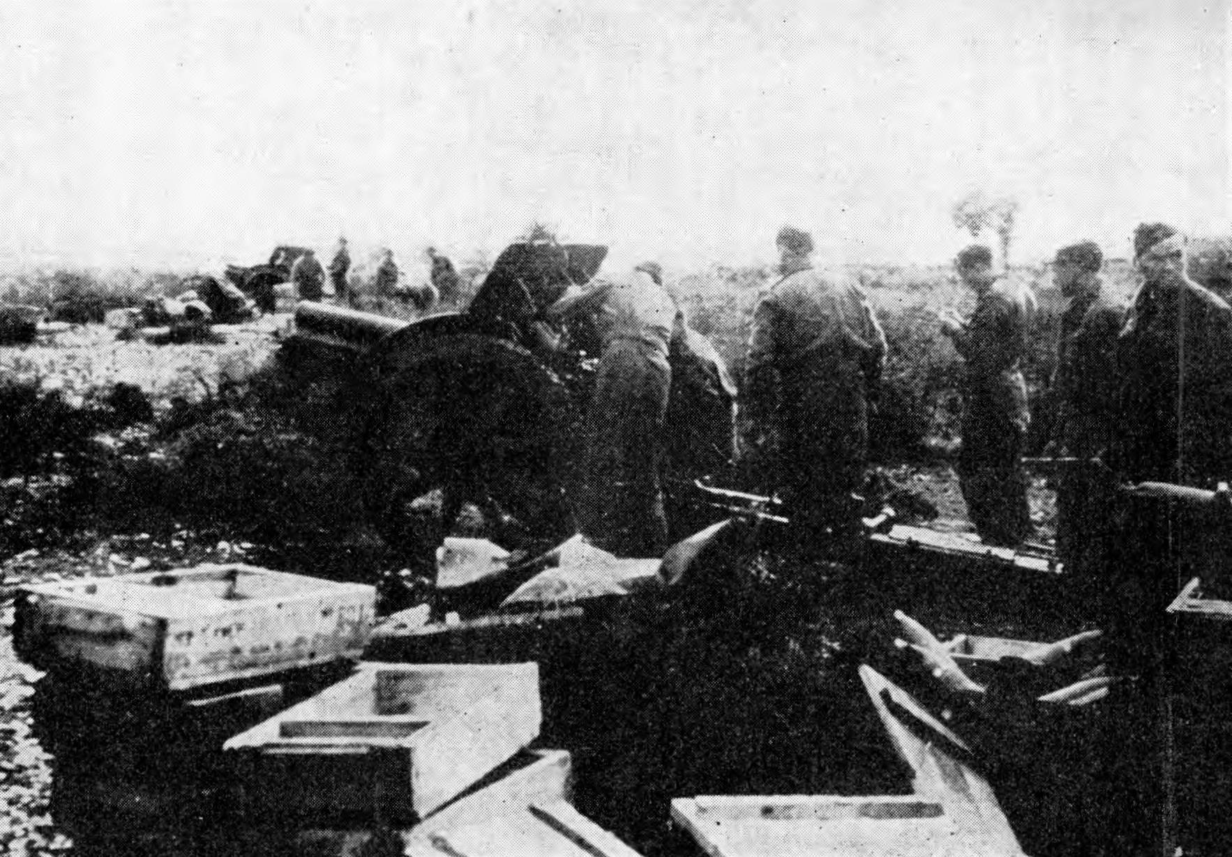 Baterija havbičnega diviziona pred Kninom decembra 1944.